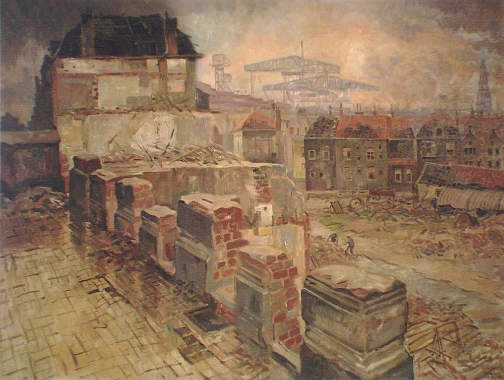 Zicht vanaf de Boulevard op door WO II oorlogsgeweld kapotgeschoten stad.